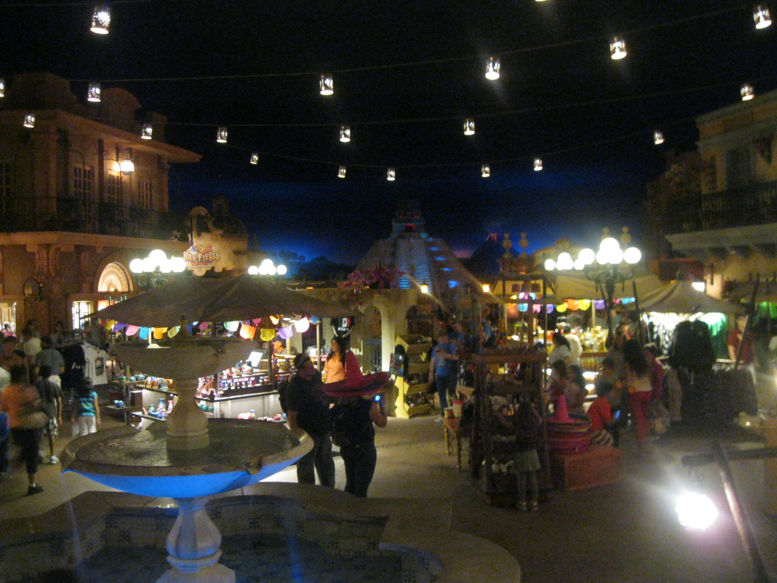 MEXICO-WALT DISNEY WORLD